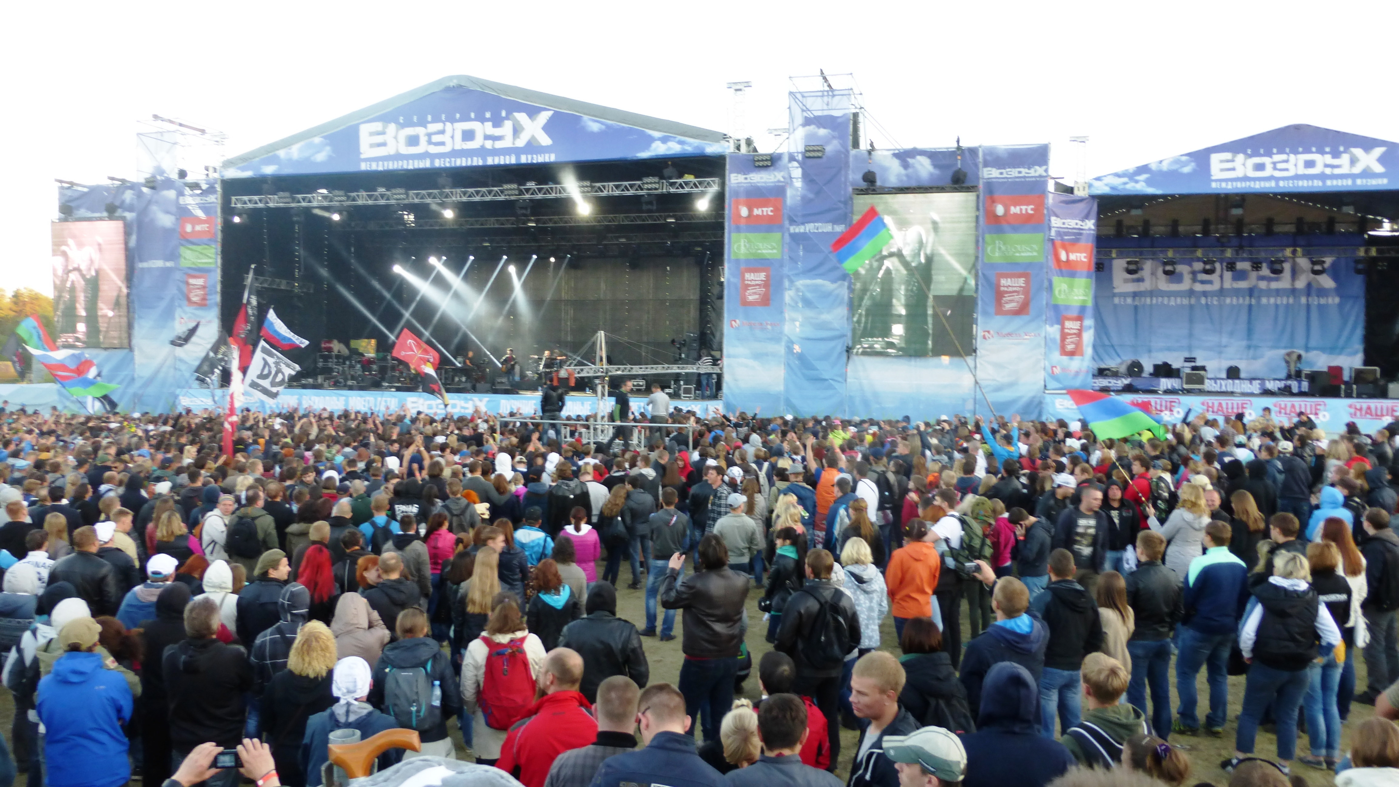 Музыкальный фестиваль "Северный воздух" в Петрозаводске. Аэродром "Пески" 20-22 июня 2014 года.